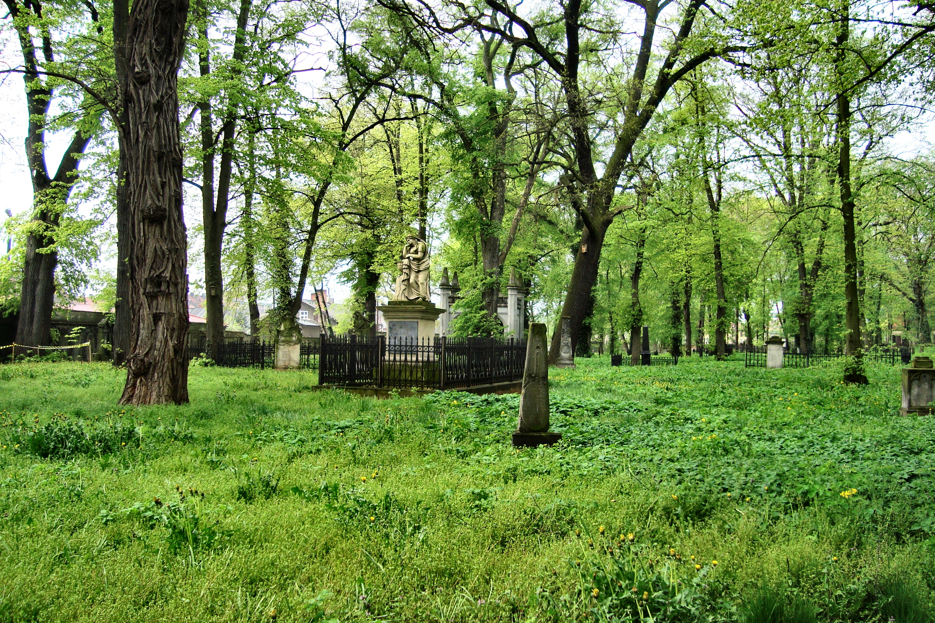 Wschowa, zespół cmentarza ewangelickiego, ob. lapidarium rzeźby nagrobnej